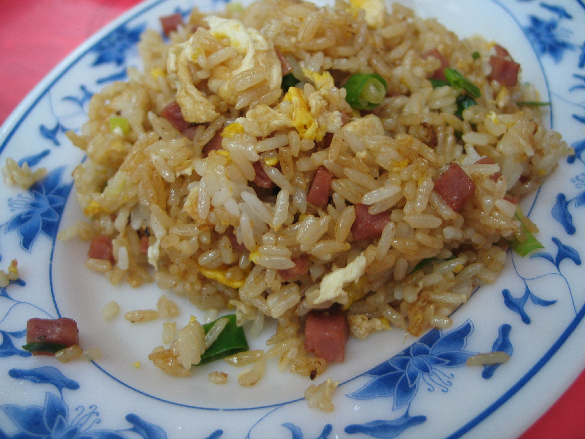 臺灣基隆市中正區碧砂漁港炒飯。